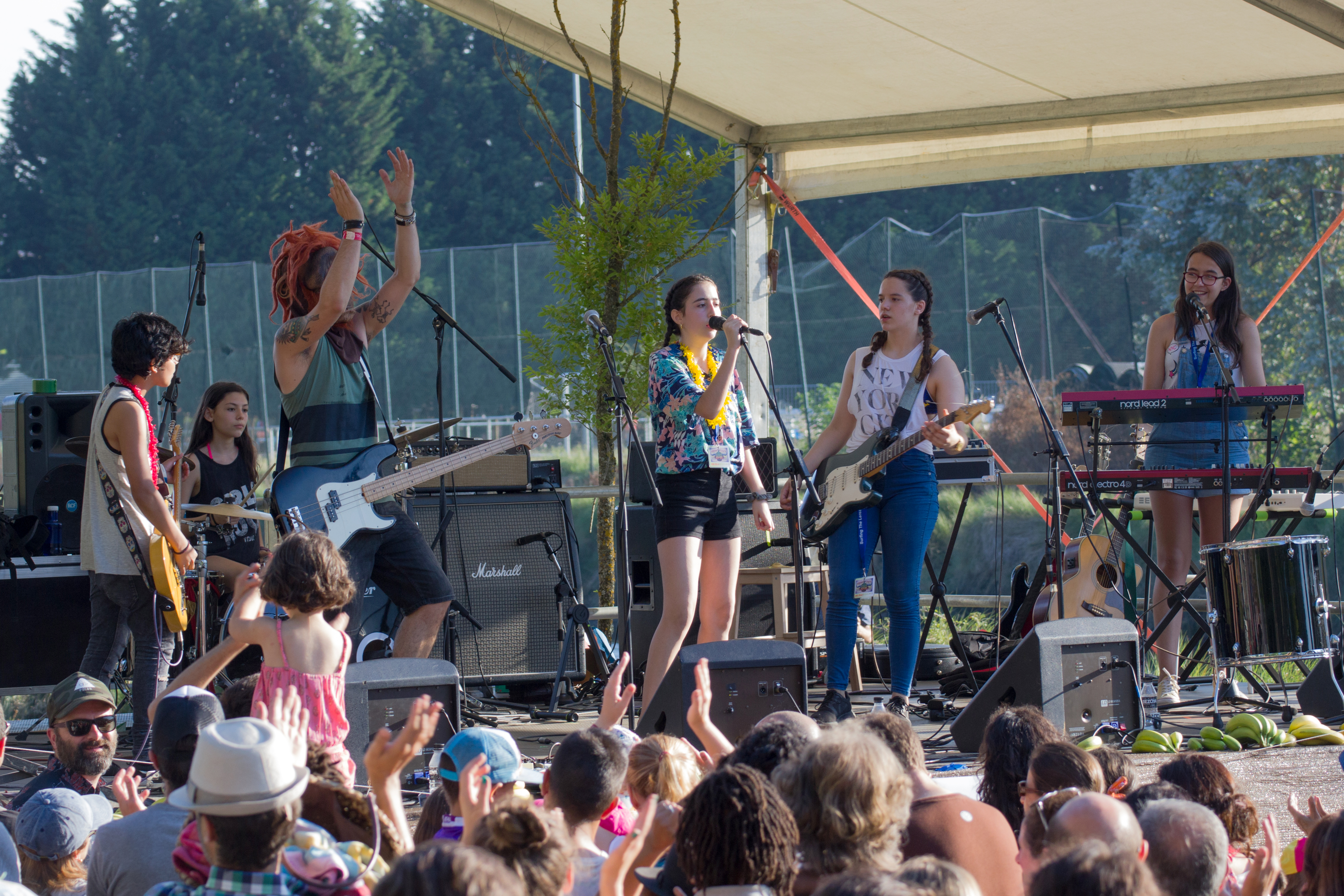 O grupo pontevedrés Furious Monkey House no Surfing the Lerez Festival de Pontevedra en 2017.